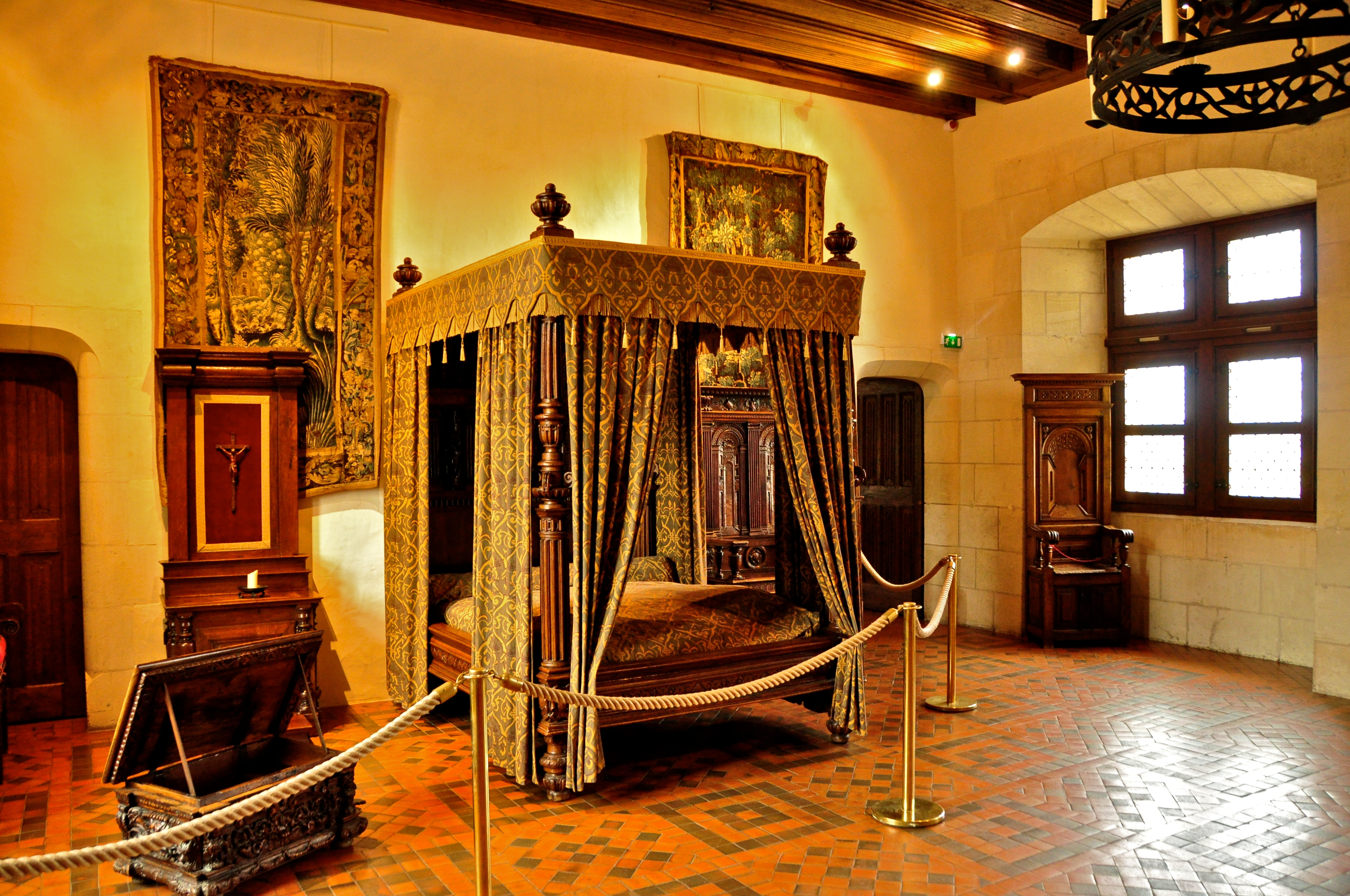 Schlafzimmer Heinrichs II. im Schloss Amboise